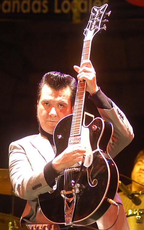 Álvaro Henríquez Pettinelli (* Concepción, 18 de octubre de 1969) es un músico chileno. Líder de las bandas Los Tres, Pettinellis, y solista. Su música ha sido una de las más influyentes en la escena musical chilena durante la década de 1990 y la de 2000. El pasado domingo 22 de agosto de 2010, se celebró el Día de la Juventud junto a la banda nacional Los Tres más otras agrupaciones juveniles con cerca de tres mil entusiastas maipucinas y maipucinos.